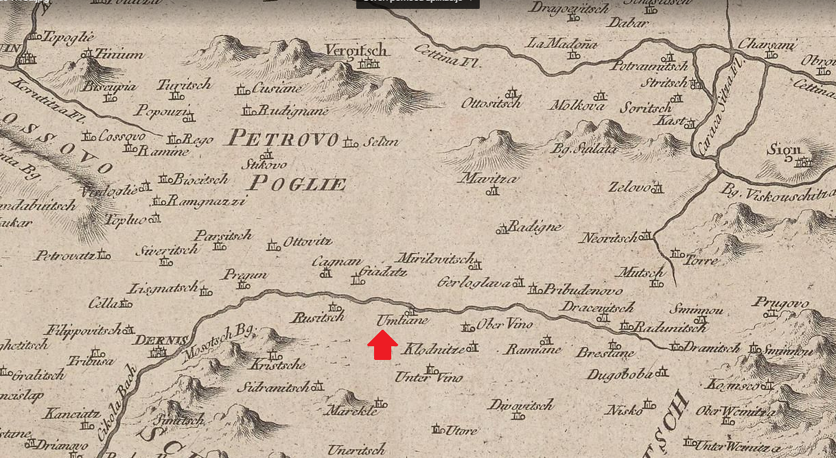 Mletački prikaz Dalmacije 1789.